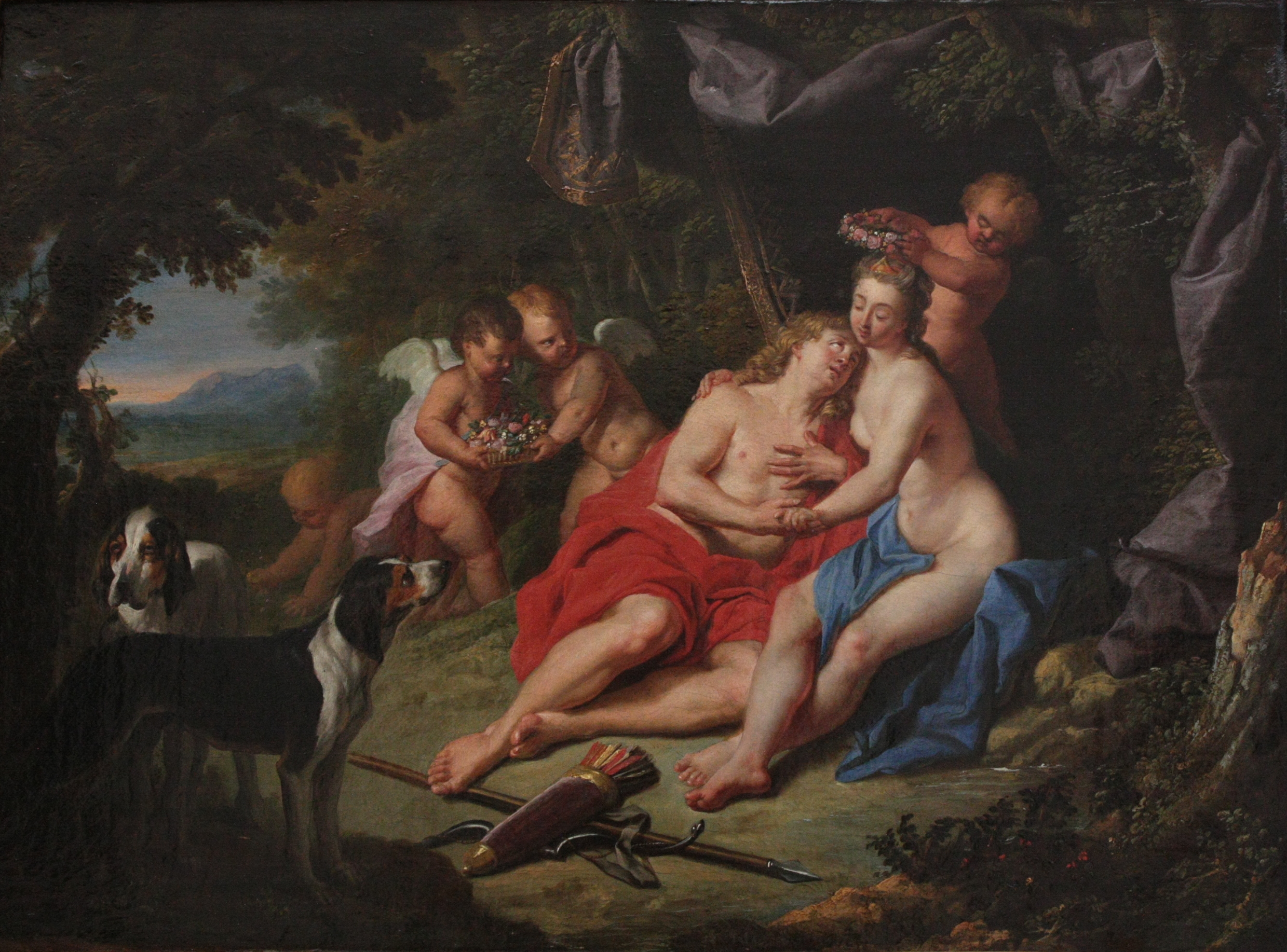 Vénus et Adonis de Jacques Ignatius de Roore